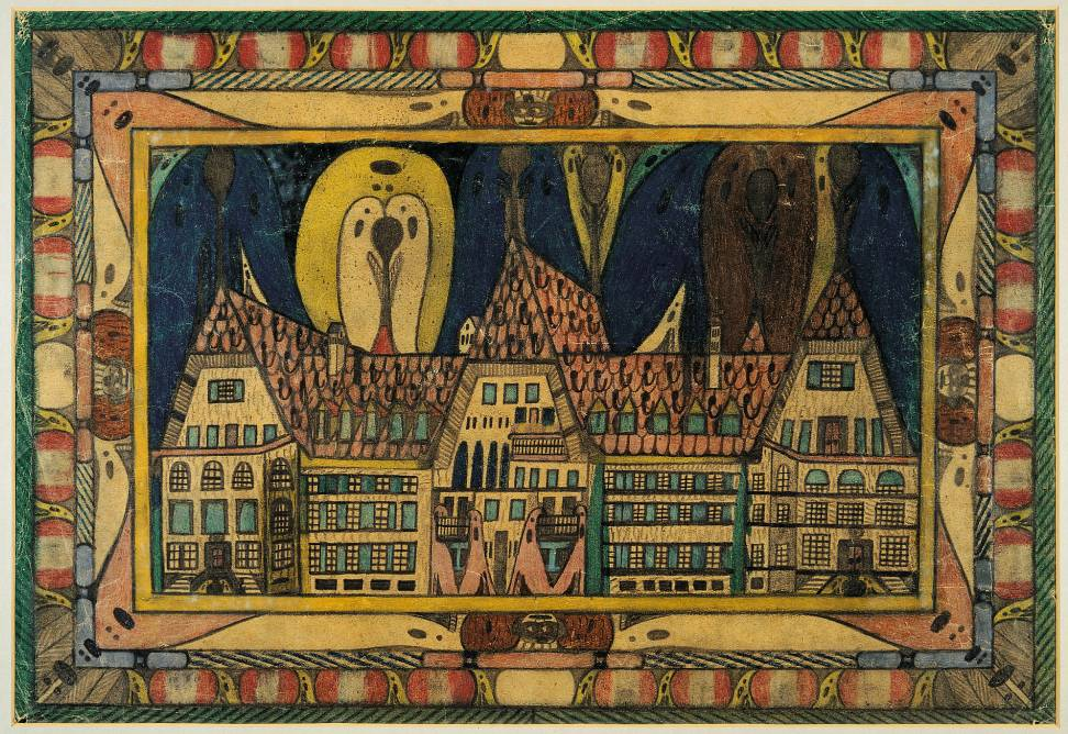 detail drawing